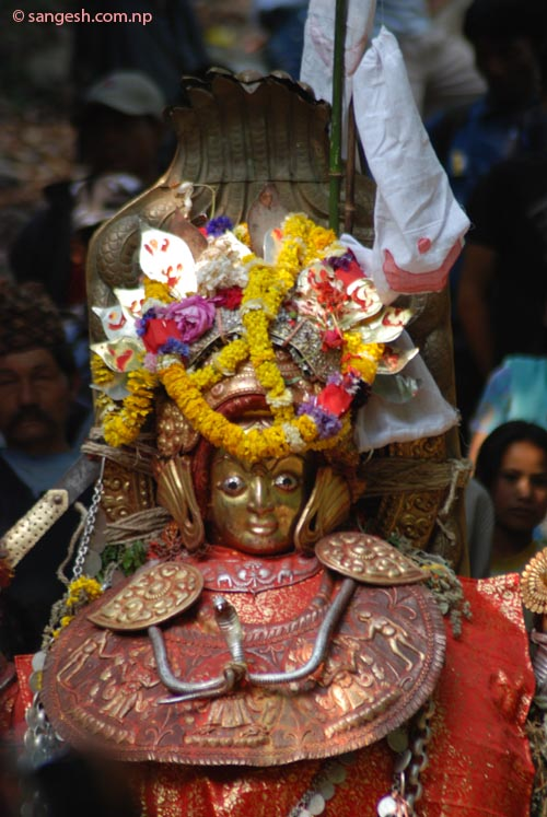 नेपाली: bajrayogini mata